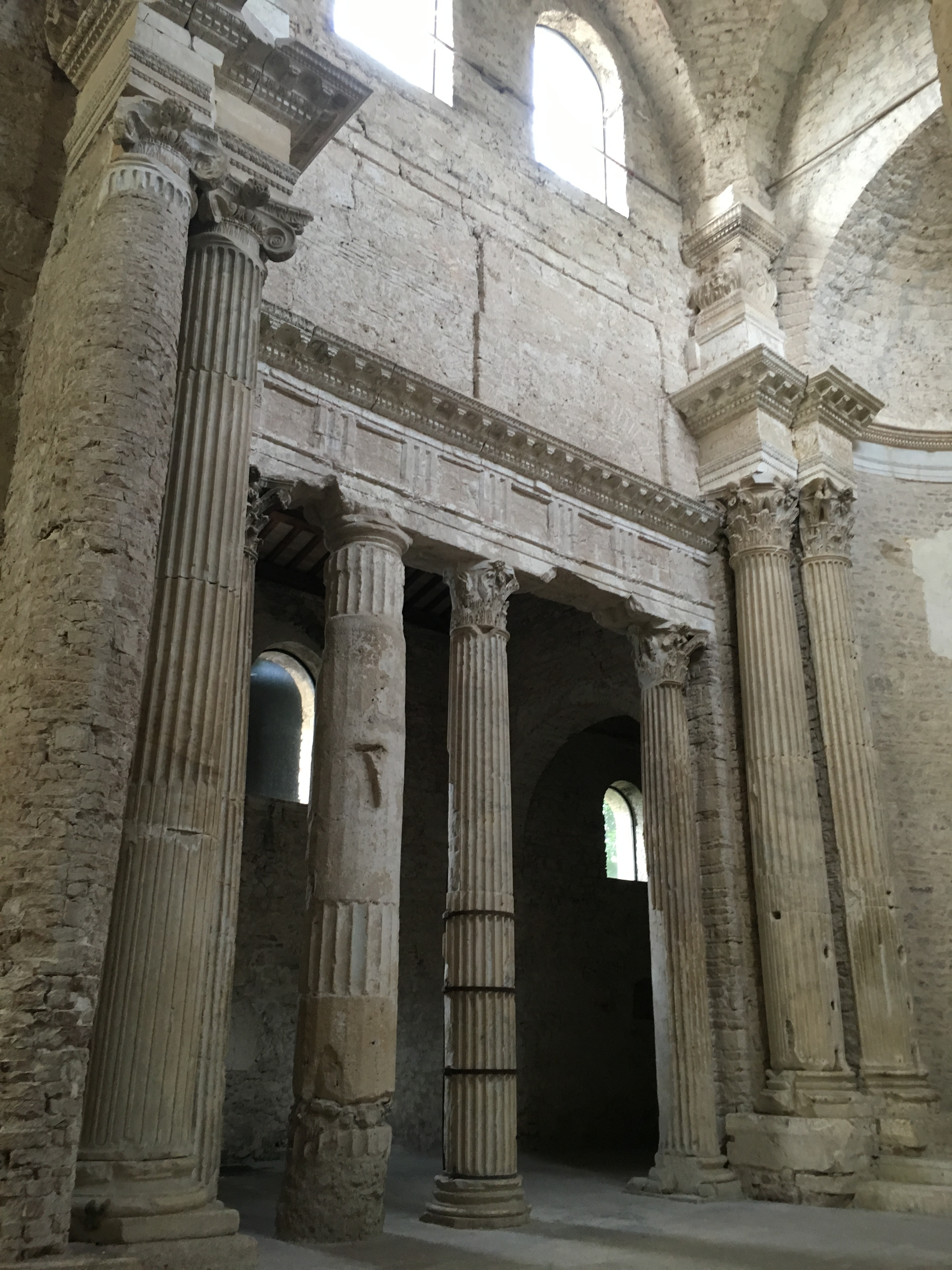 San Salvatore Spoleto